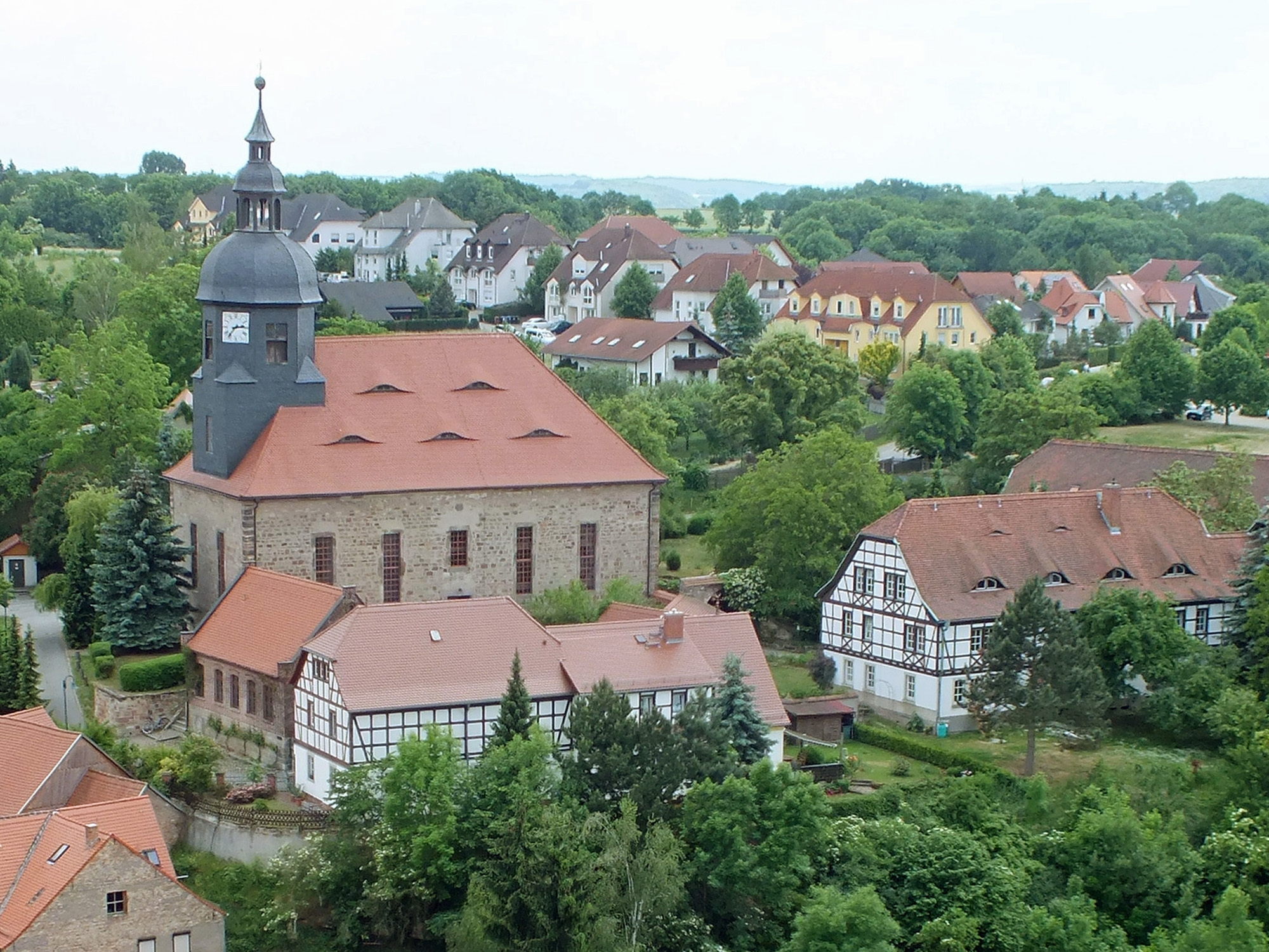 Kirche und Tagungsheim in Schönburg (Saale)